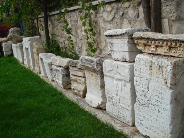 Dosya yükleyen kullanıcıya aittir. Resim, Yalvaç, Isparta'daki Yalvaç Müzesi'nin bahçesinde çekilmiştir.